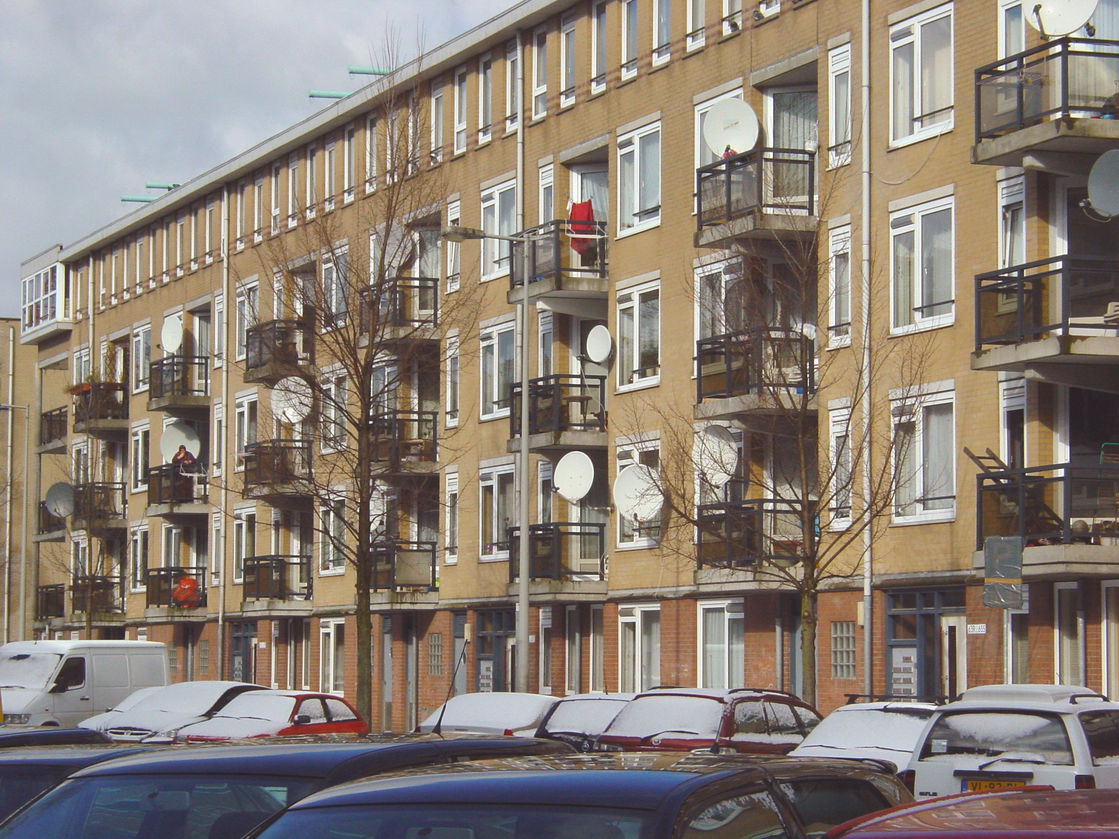 Ik heb de foto gemaakt, geen copyright